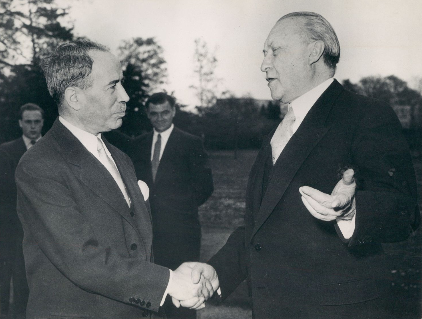 1955 Photo Antoine Pinay Konrad Adenauer Shake Hands Bonn West Germany